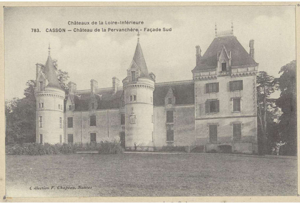 Casson - Château de La Pervanchère - façade sud